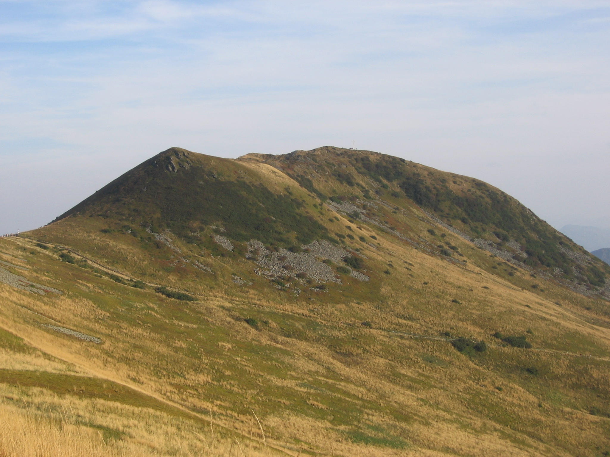 Tarnica peak in Bieszczady mountains - view from Szeroki Wierch. Widok na Tarnicę z Szerokiego Wierchu.